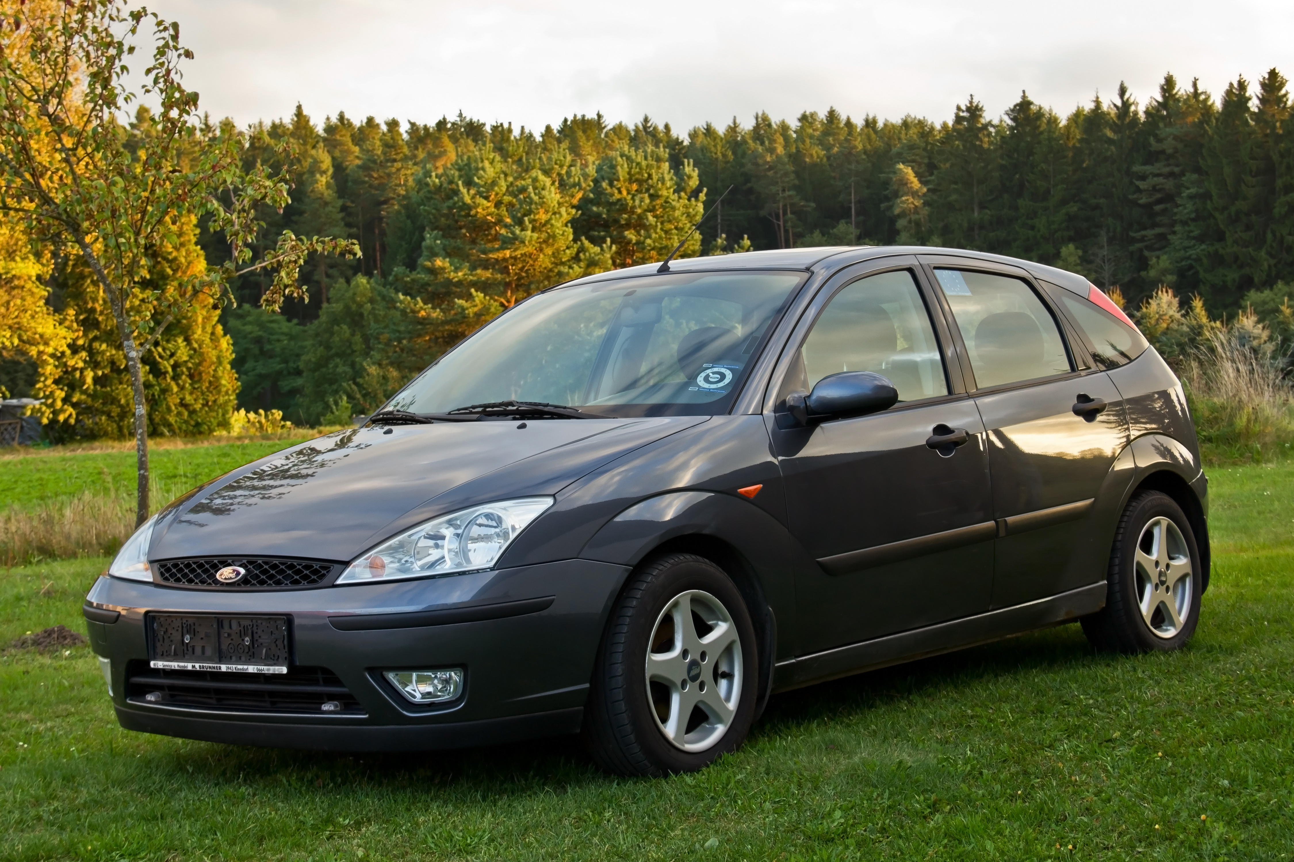 Ford Focus MK I 1.8 TDDi 90 PS Ambiente